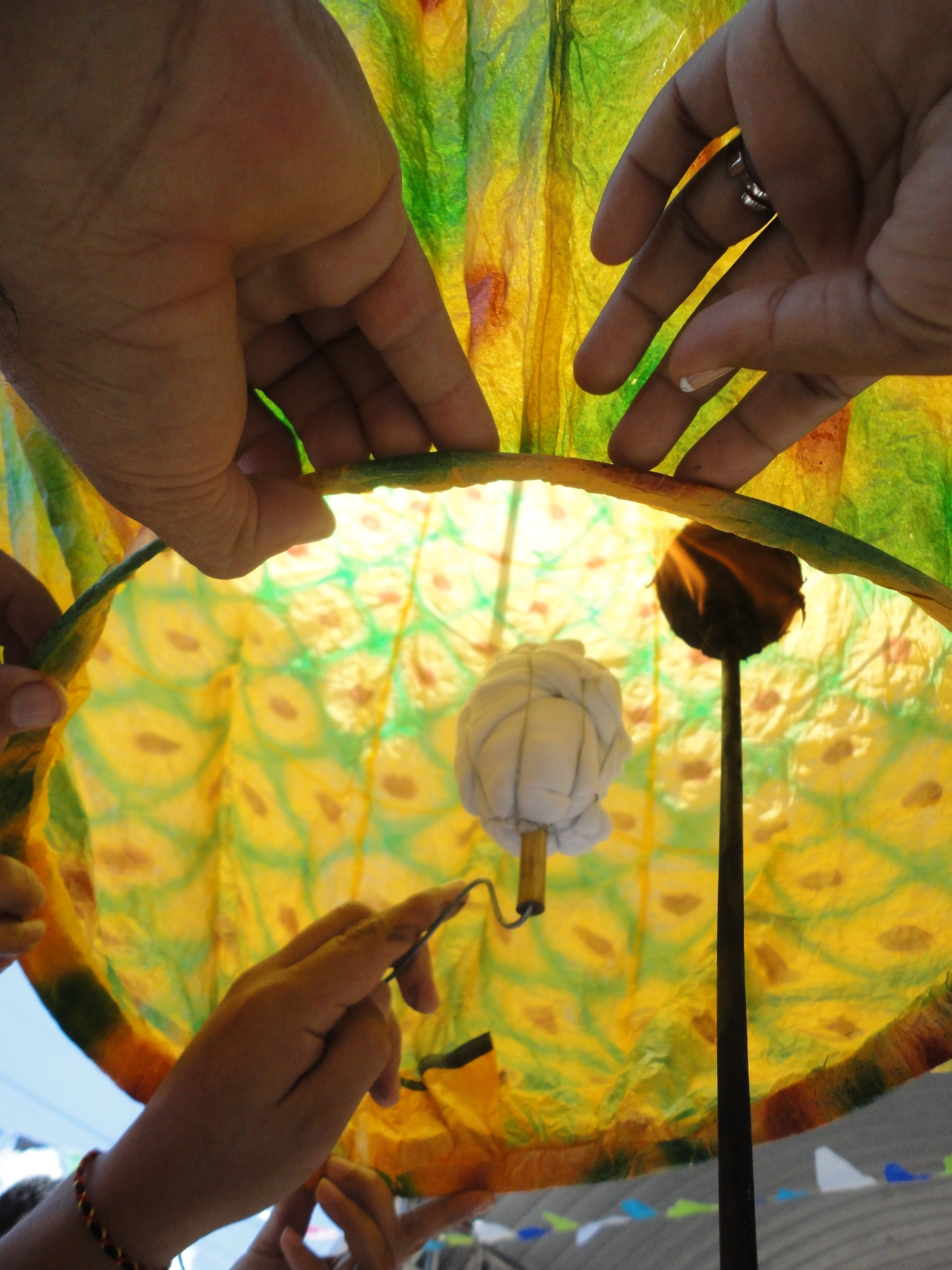 Lanzamiento de un Globo de papel, Festival De Globos San esteban catarina.